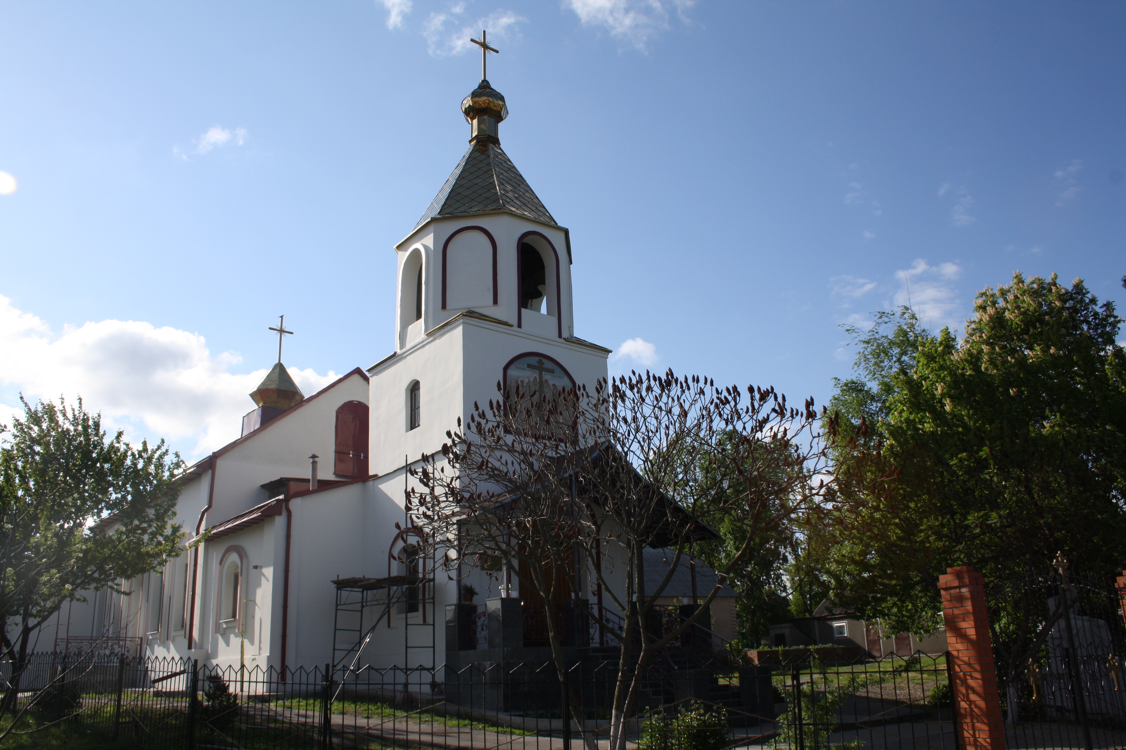 Сільська церква, Черкаська Лозова, вид справа.